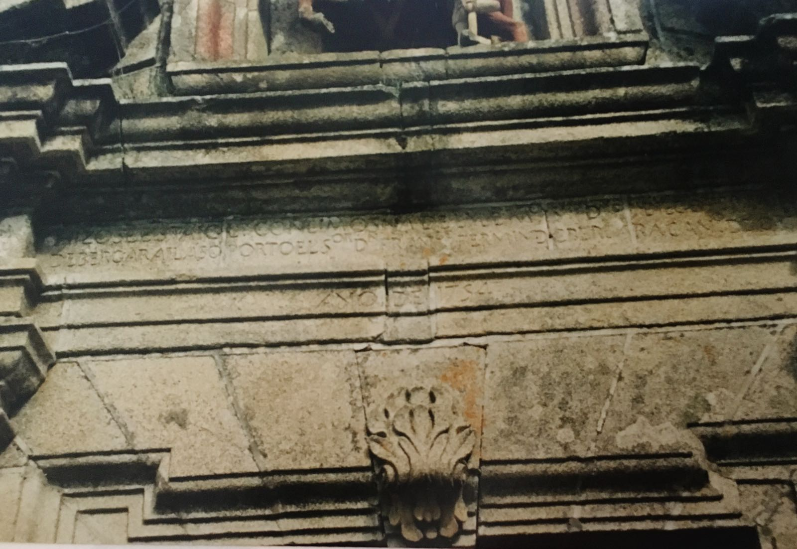 Inscripción que figura na fachada do templo e dátao en 1754